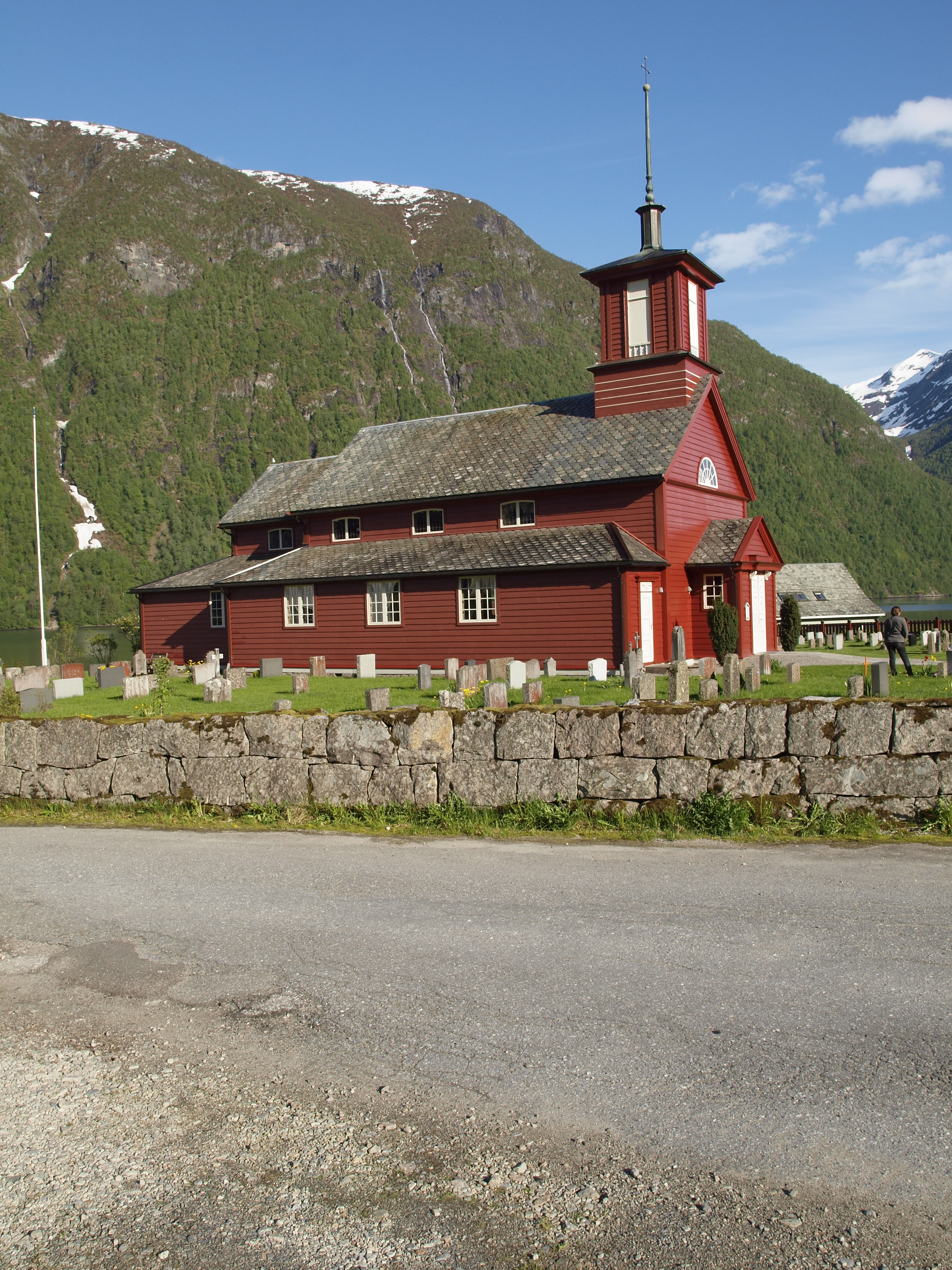 Die Kirche Fjaerland, in Komune Songdal, Norwegen